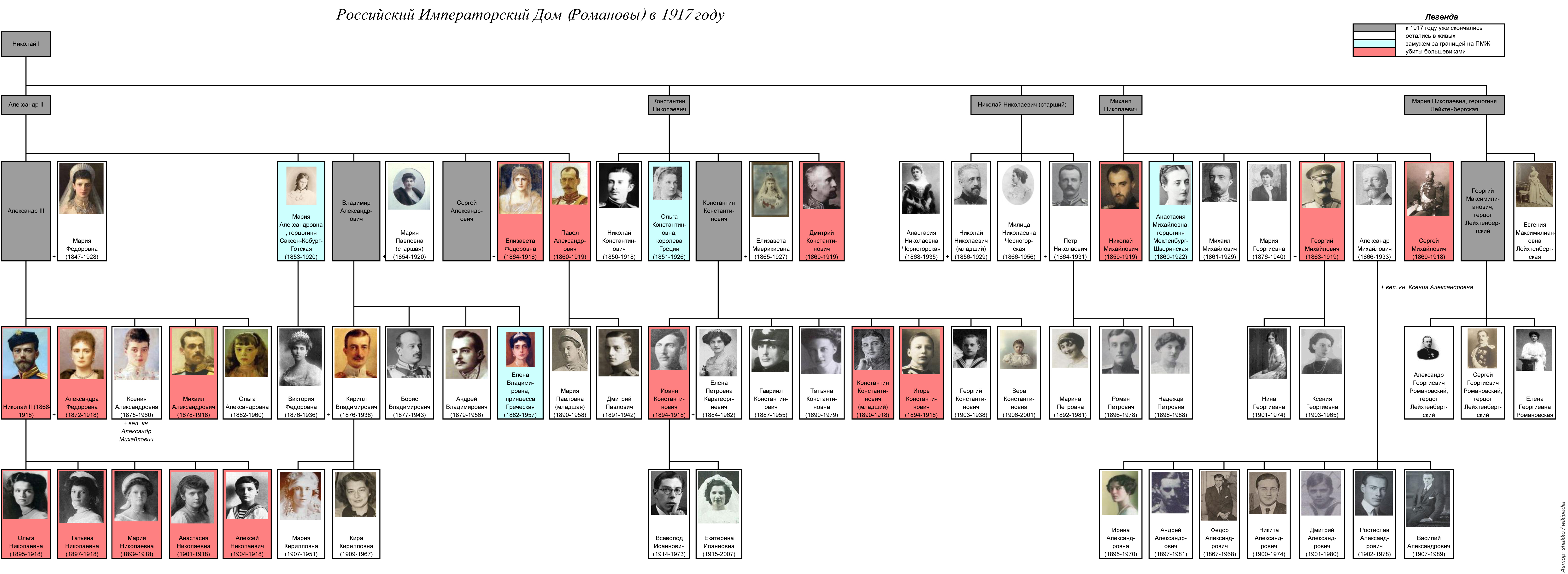 Генеалогическое древо дома Романовых на февраль 1917 года. Древо состоит членов Российского Императорского Дома (без морганатических супругов), список которых взят из адрес-календаря за 1916 год (65 имен). Убитые большевиками отмечены красным цветом.